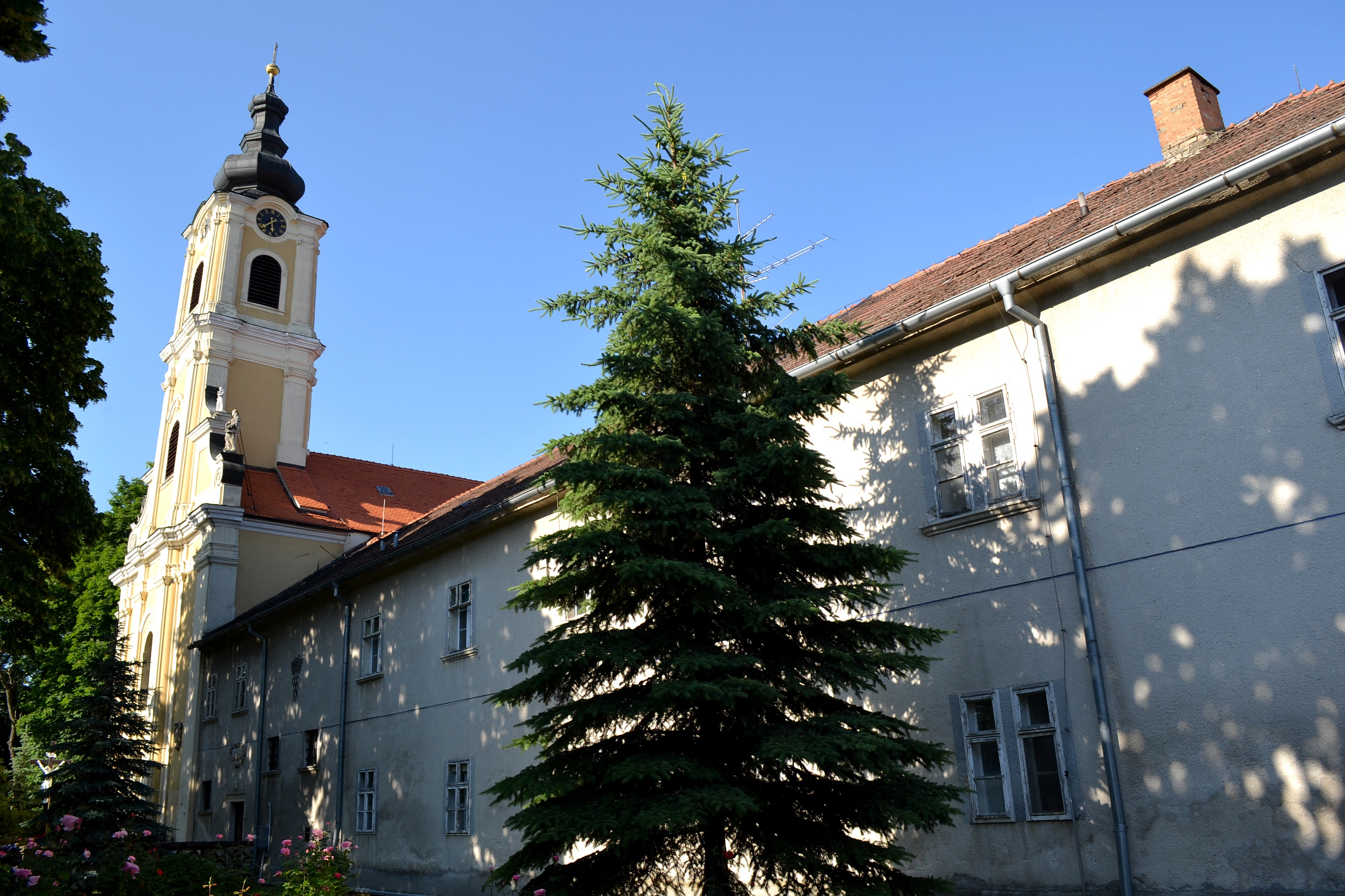 Báč, Kostol svätého Antona Padovského; pohľad na kostol s priľahlým kláštorným krídlom